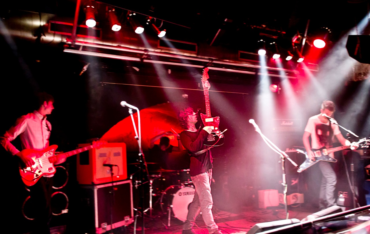 Chelsea, Vienna